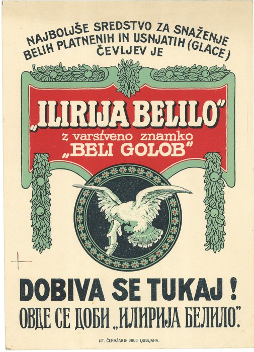 Plakat za Ilirija belilo